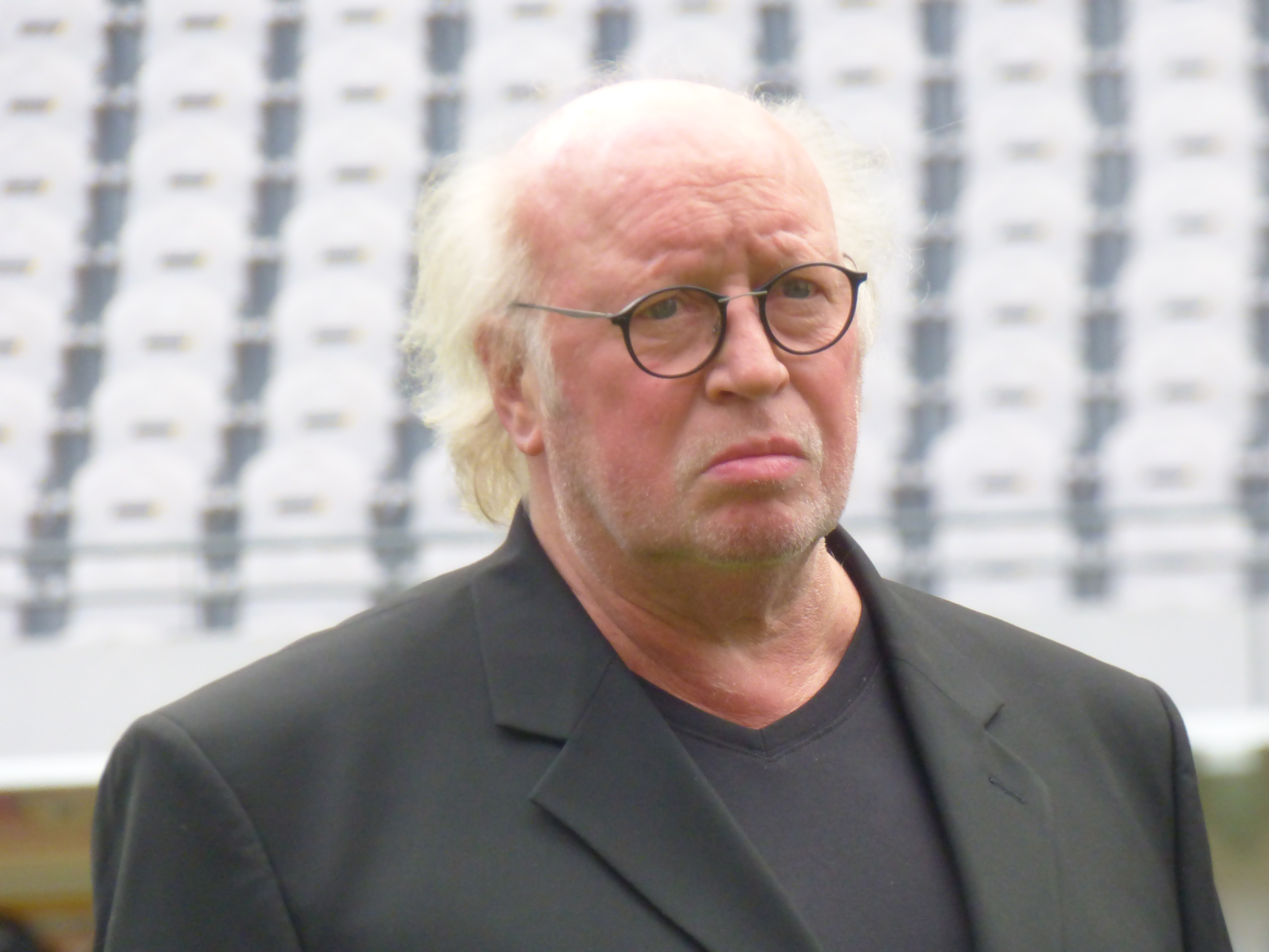 Daniel Leclercq avant le match Lens / Sochaux, comptant pour la septième journée du championnat de France de football de Ligue 2, le 15 septembre 2018.